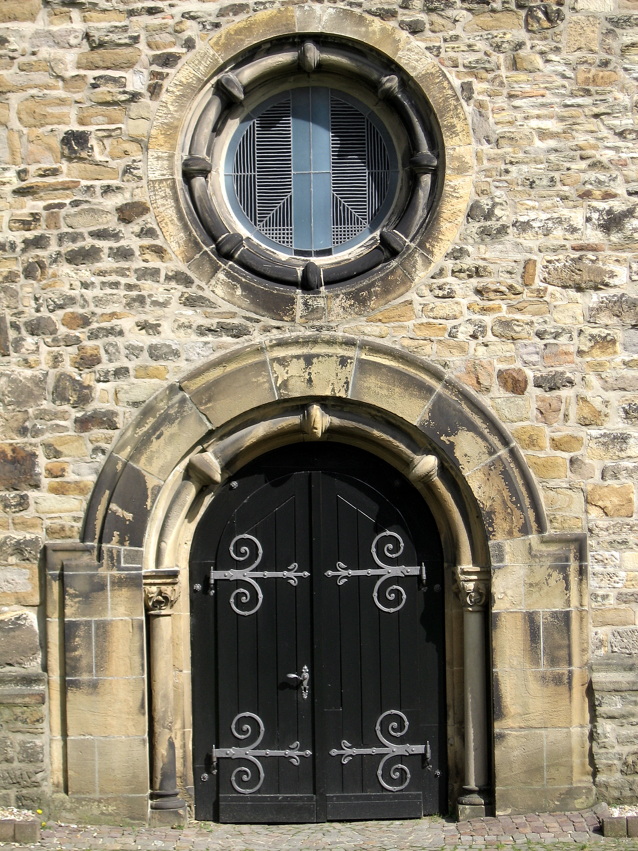 Dortmund, Wellinghofen, Alte Kirche, Westportal im Mittelalter Rastort auf dem Pilgerweg nach Syburg Ende 12. Jh. als Kreuzsaalkirche erbaut, Westturm 14. Jh: Erweiterung zur einjochigen Hallenkirche, Apsis durch rechteckigen Chor ersetzt, der im 19. Jh neugotisch erweitert wurde 1977-79 restauriert, unter anderem der Fragmente der Bemalung